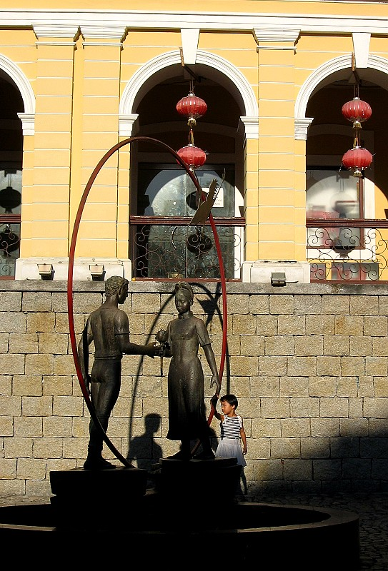 《男女與狗》中的「男女」。